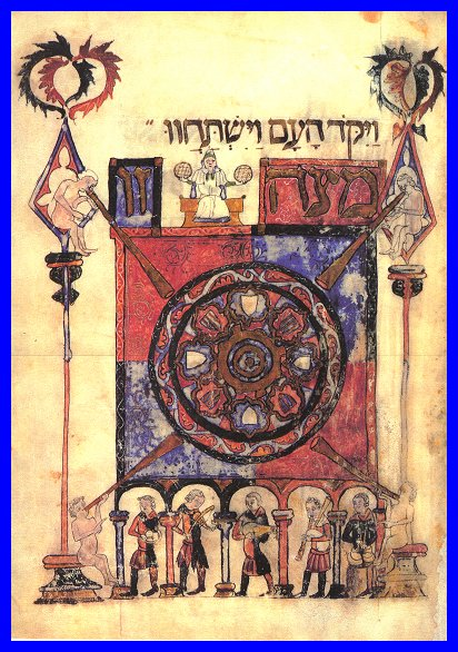 דף הגדה מתוך הגדת ברצלונה. בתחתית האיור נגנים בכלים מגוונים.